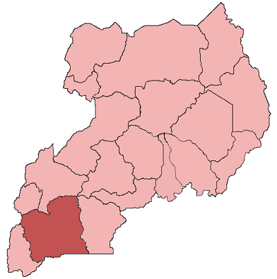 Mappa dell'arcidiocesi cattolica di Mbarara, in Uganda. Lavoro personale, eseguito a partire da questa immagine di Commons. Fonte per i confini delle diocesi: Guida delle missioni cattoliche 2005, a cura della Congregatio pro gentium evangelizatione, Roma, Urbaniana University Press, 2005. Categoria:Chiesa cattolica in Uganda